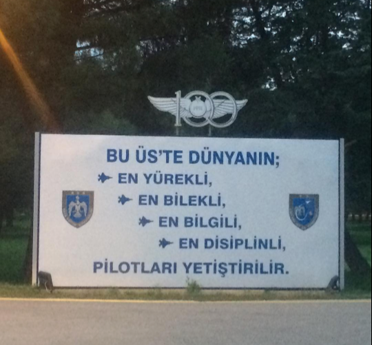 2.Ana Jet Üs Komutanlığı girişindeki yazı